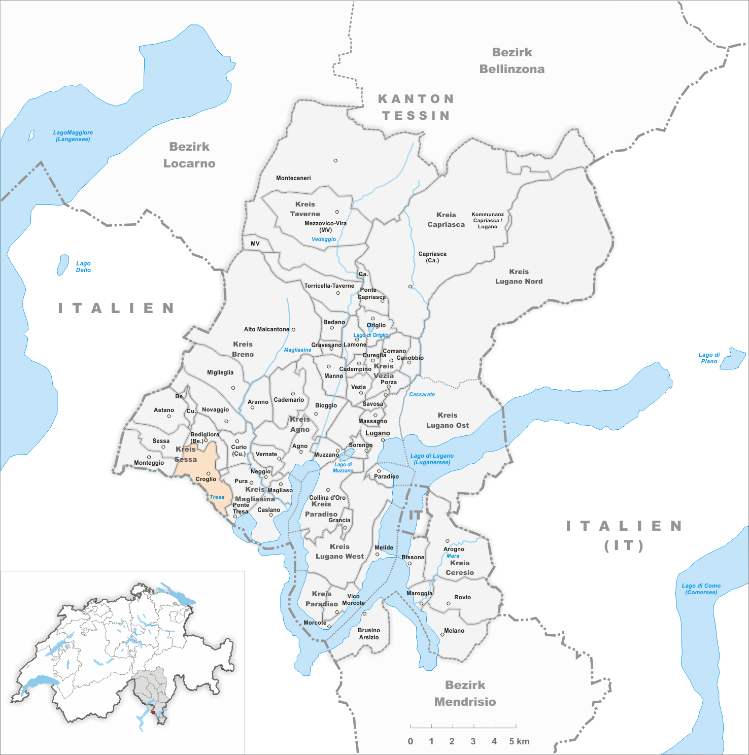 Municipality Croglio